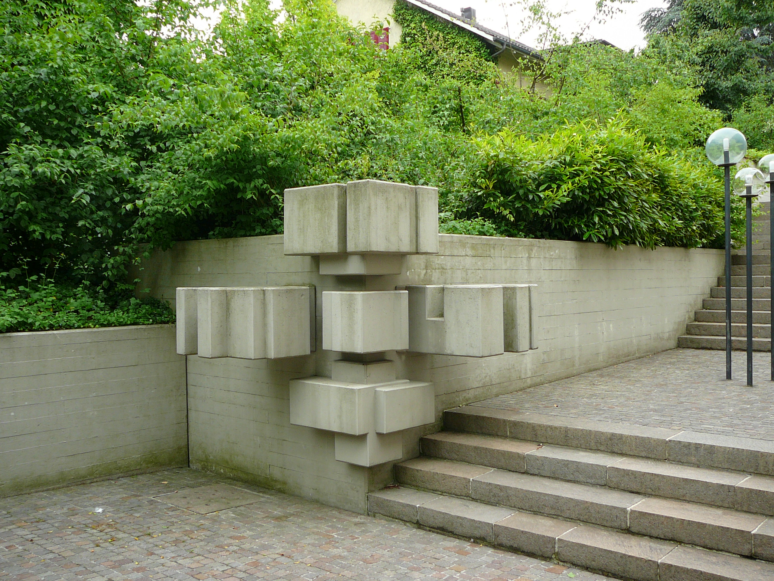 Römisch-katholische Pfarrkirche St. Katharina, Zürich-Affoltern